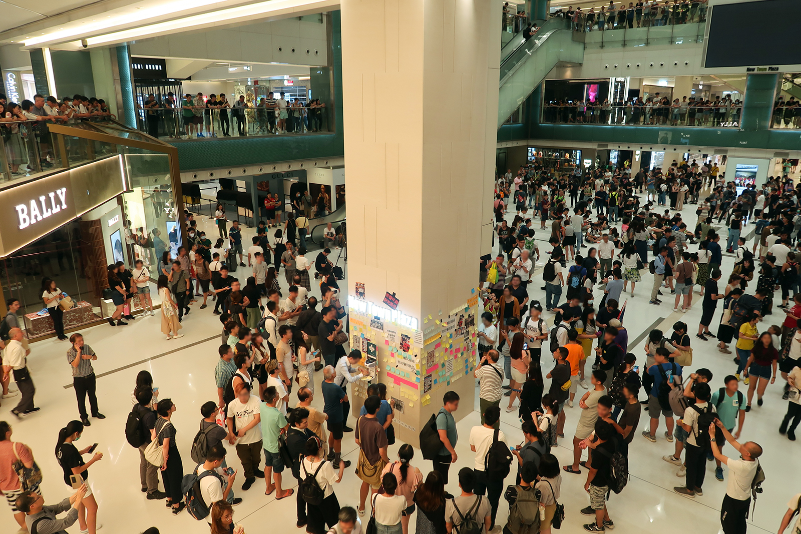 Lennon wall in L3 Entrance Void